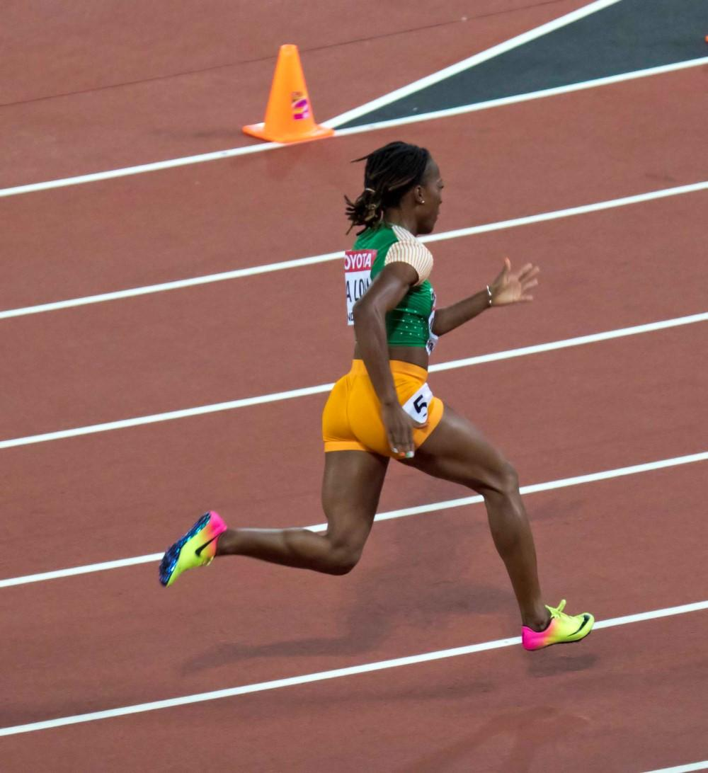 d6_13 200m ta lou